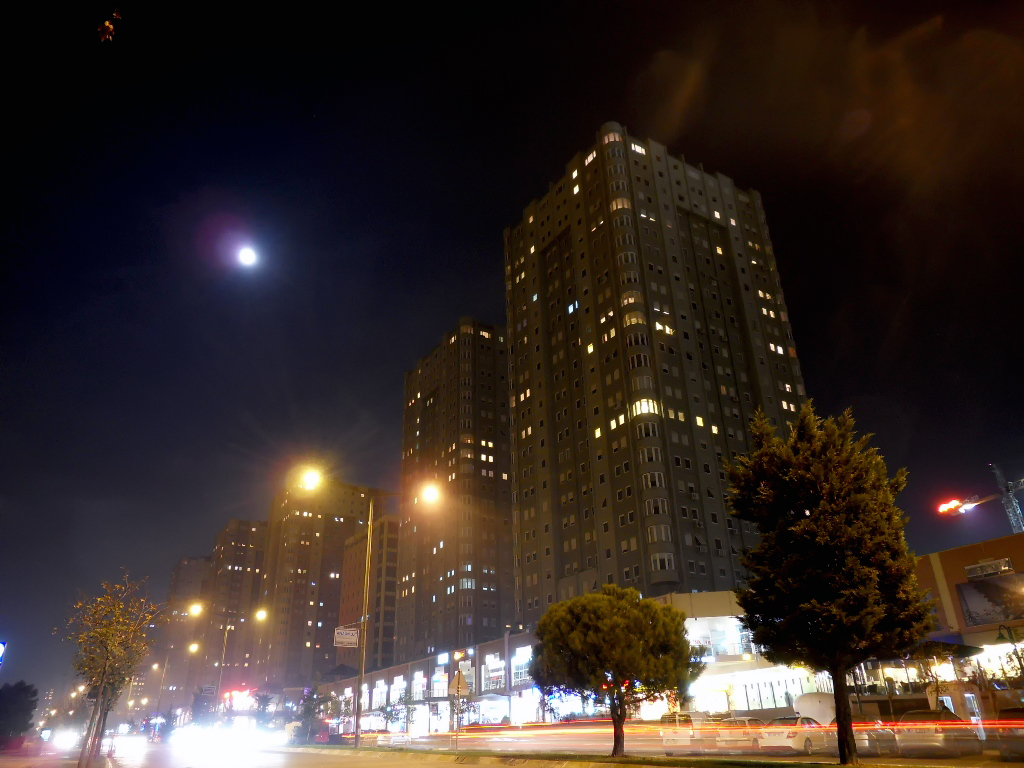 Ataşehir'in ilk yerleşim bölgesi